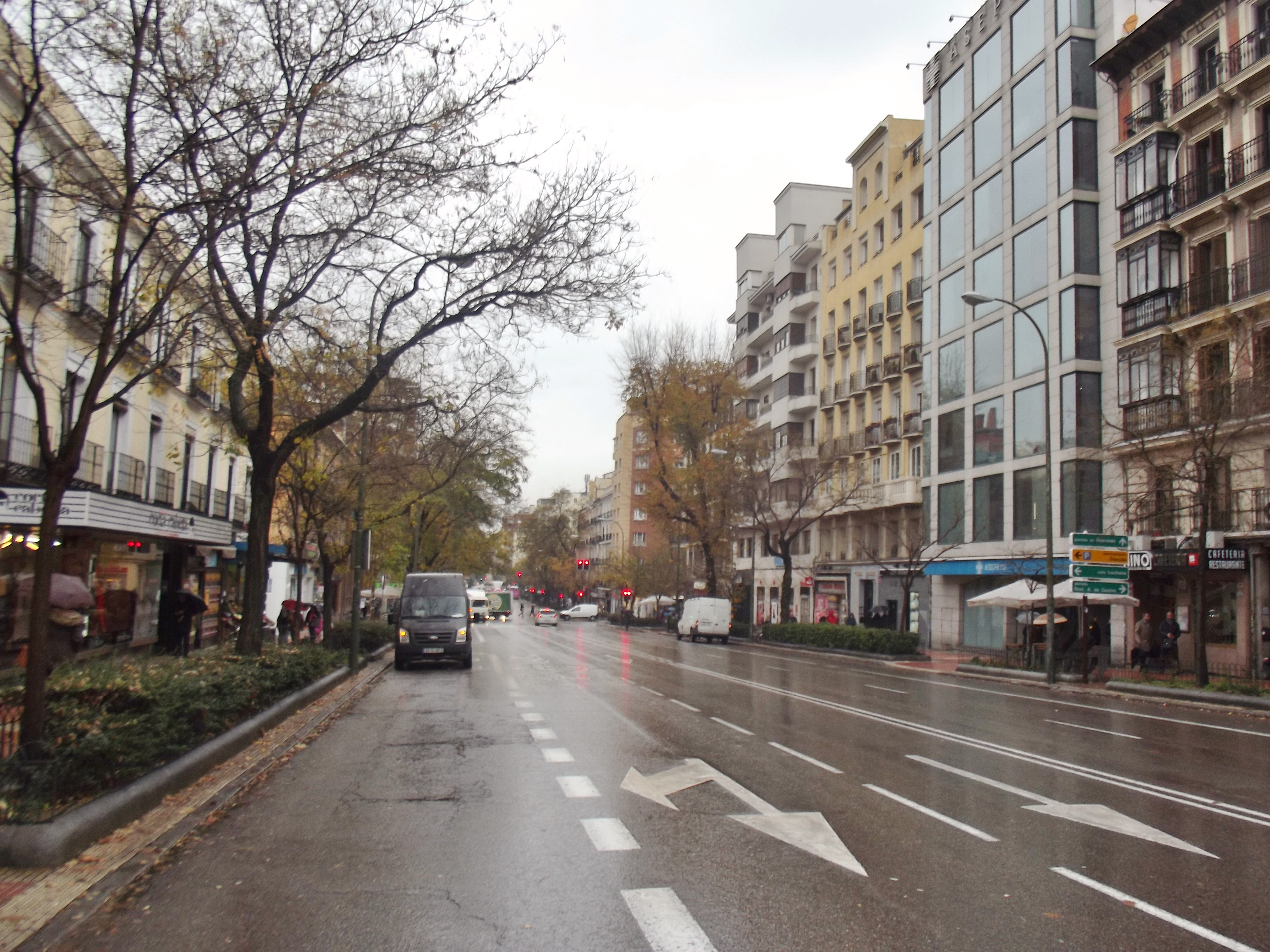 Calle de Eloy Gonzalo, Madrid